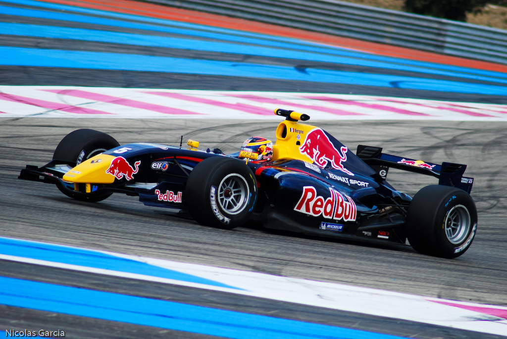 Жан-Эрик Вернь (Carlin), Мировая Серия Рено 2011 год, Поль-Рикард, прогревочный круг